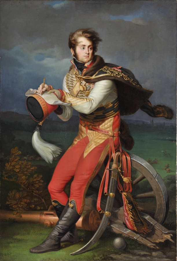 Portrait de Louis-François, baron Lejeune (1775-1848)